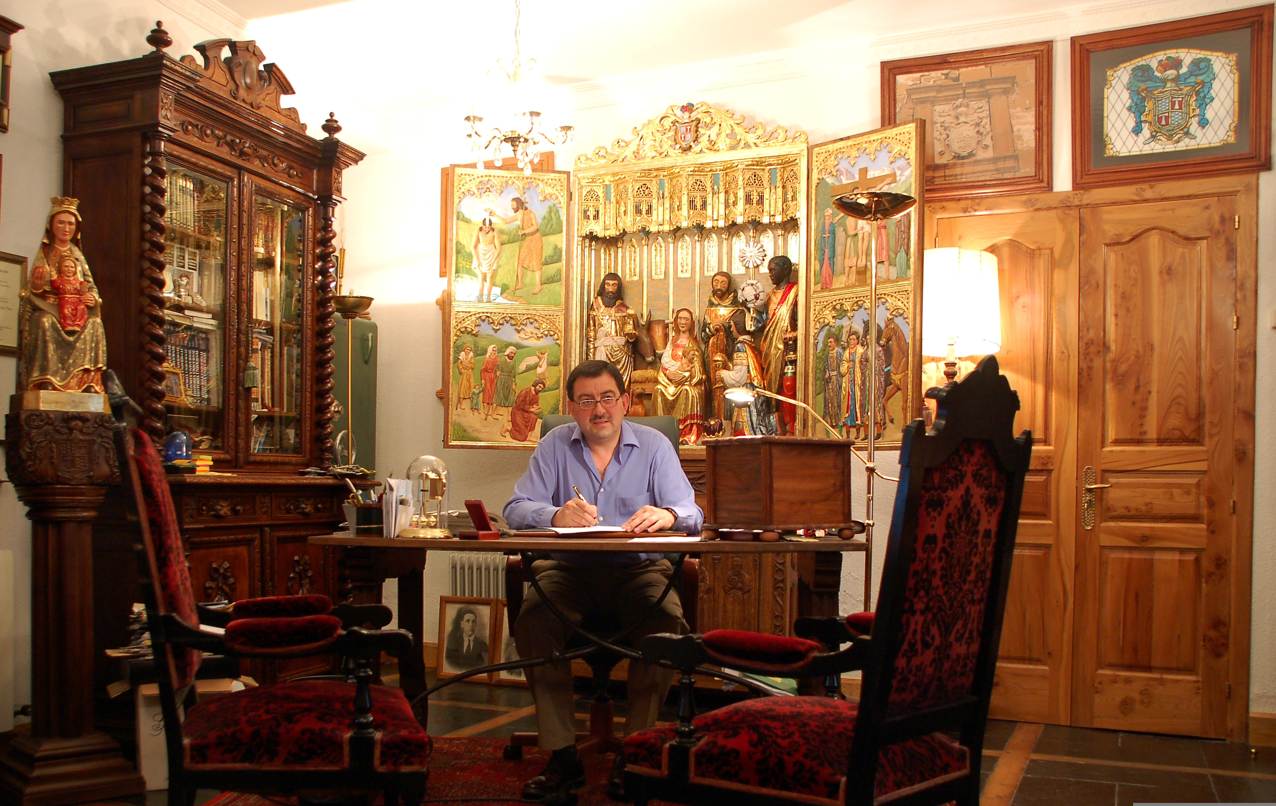 Picture of Jèp de Montoya